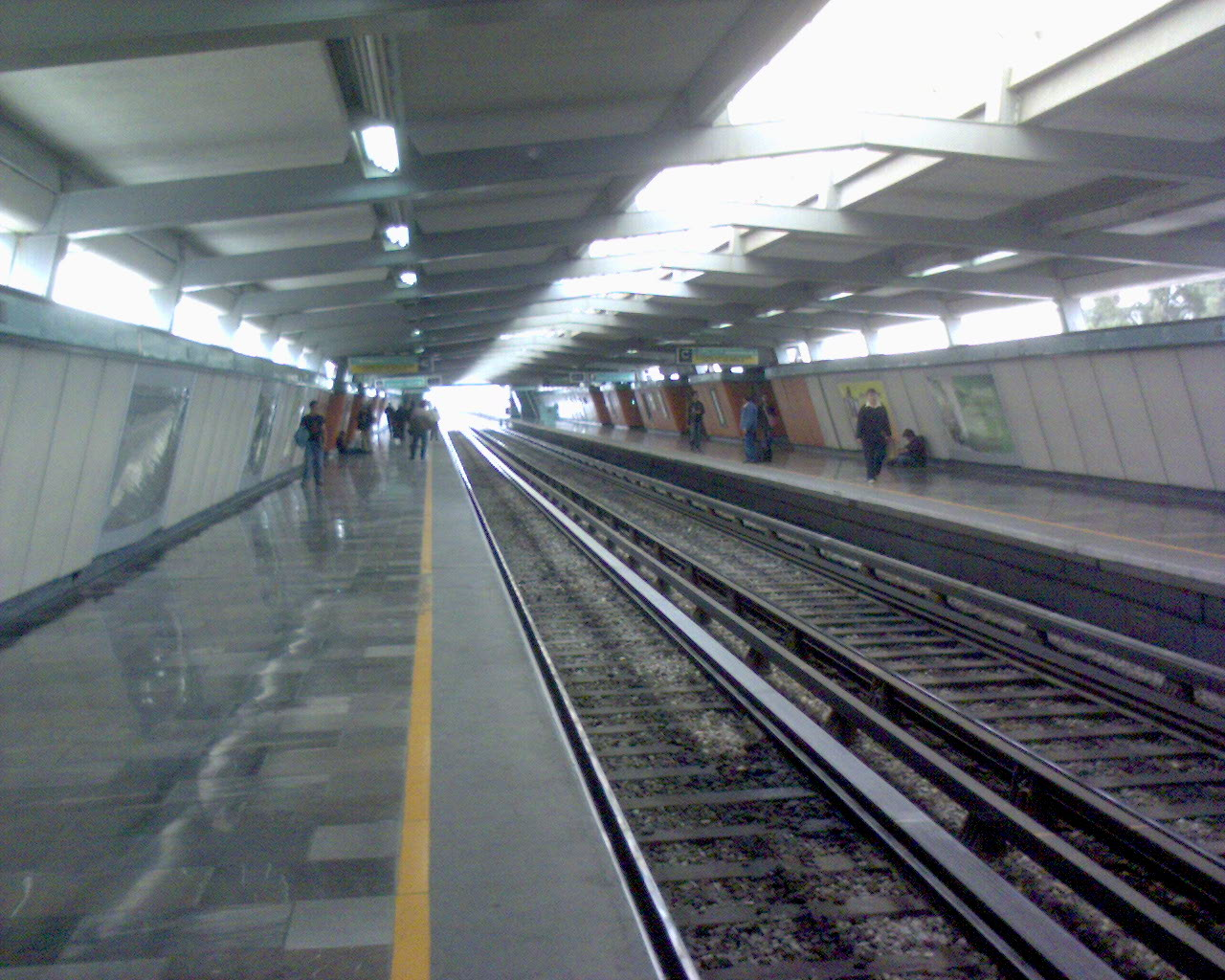 Estacion Consulado